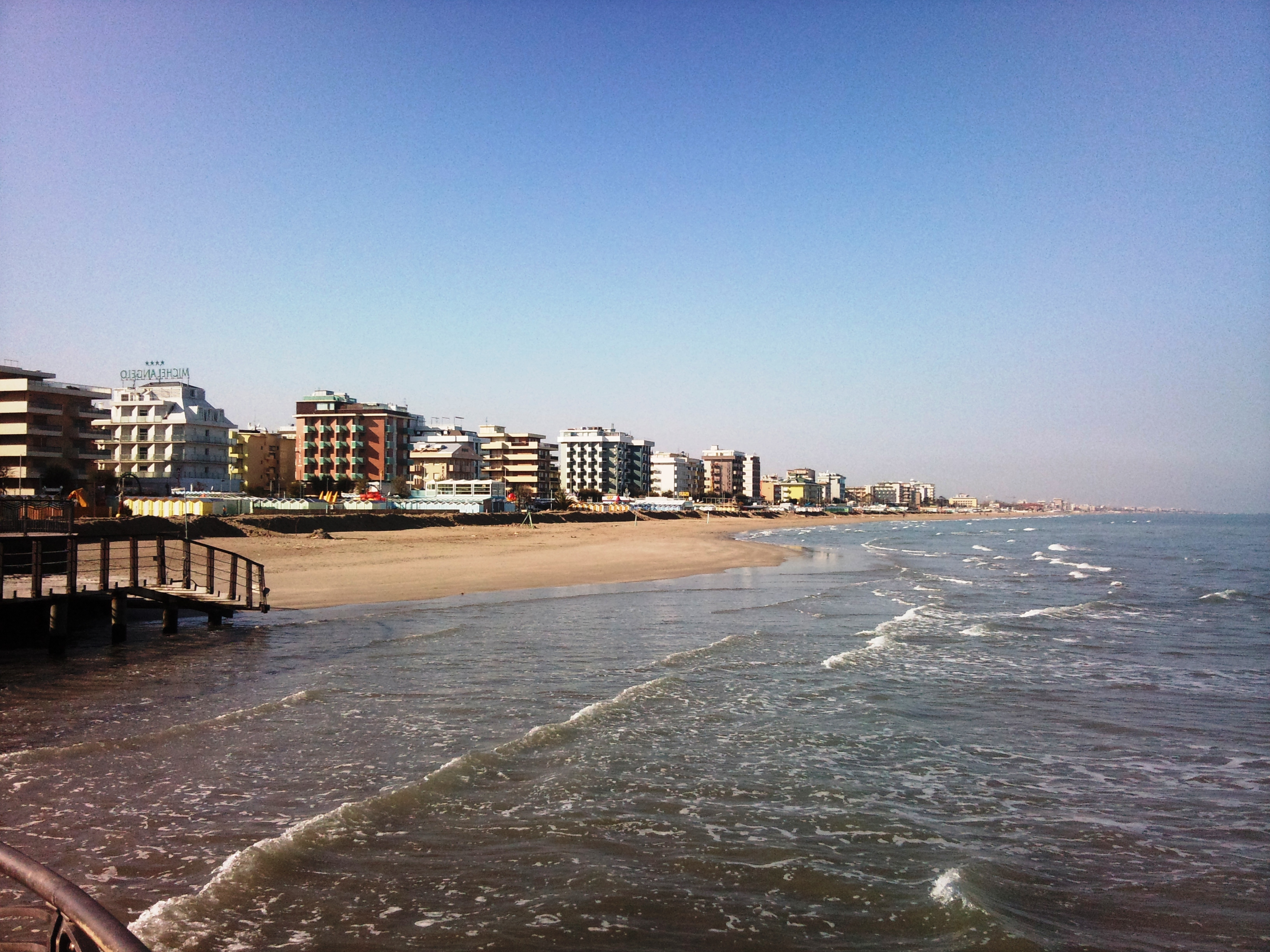 Foto scattata da l'utente Antonfon